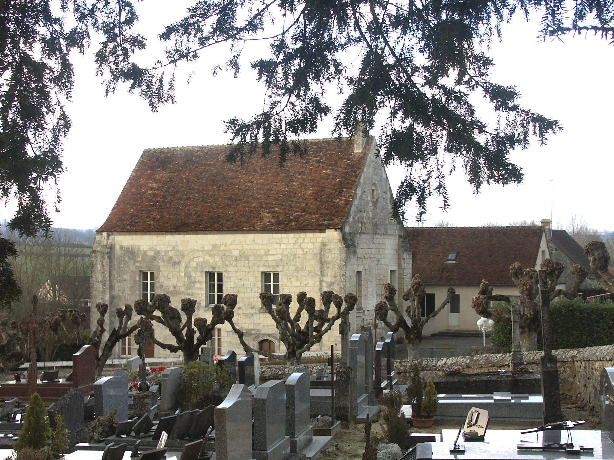 Vue du sud. 12e s. ISMH 1974 .